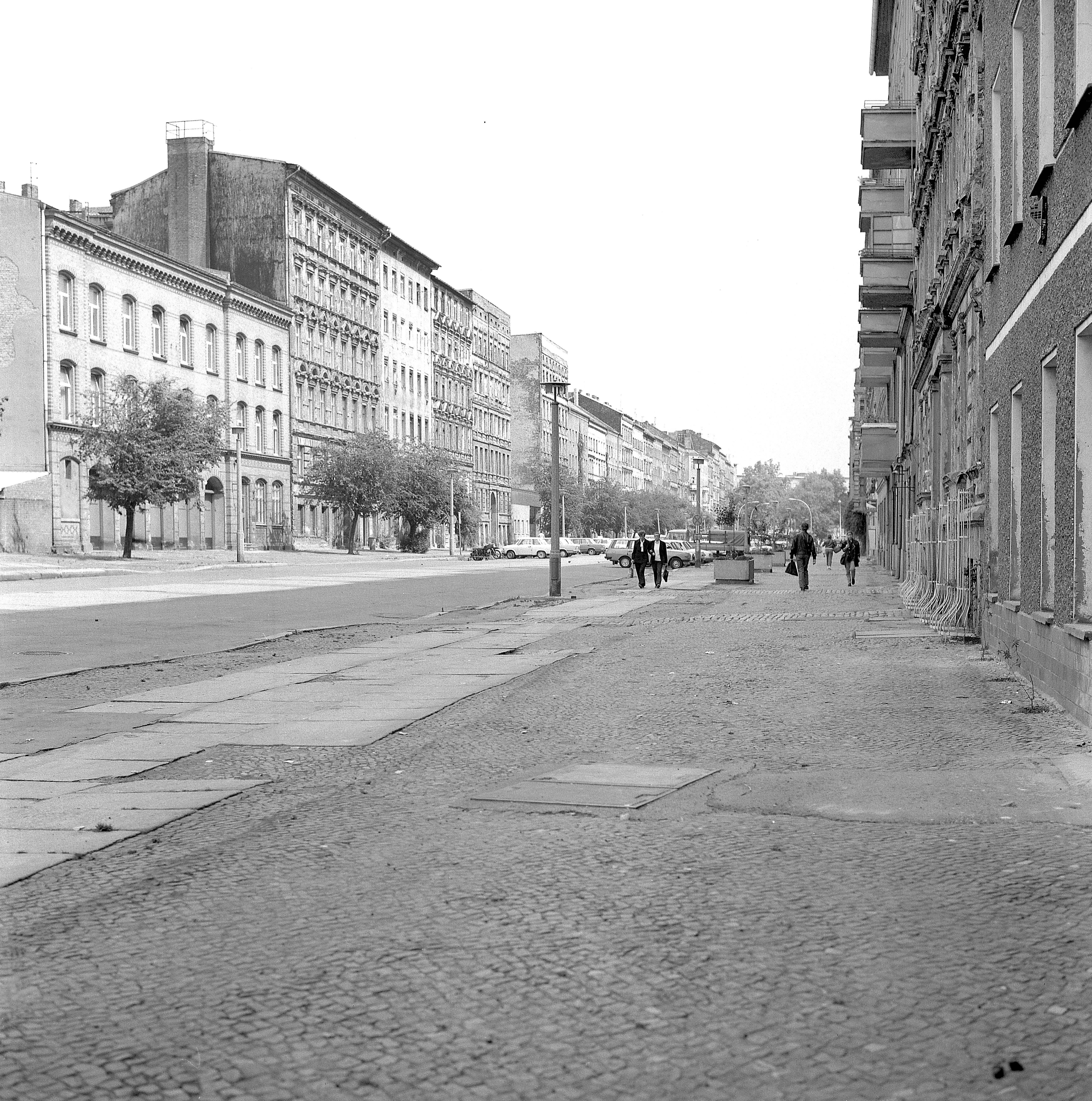 Oderberger Straße Straßenansicht